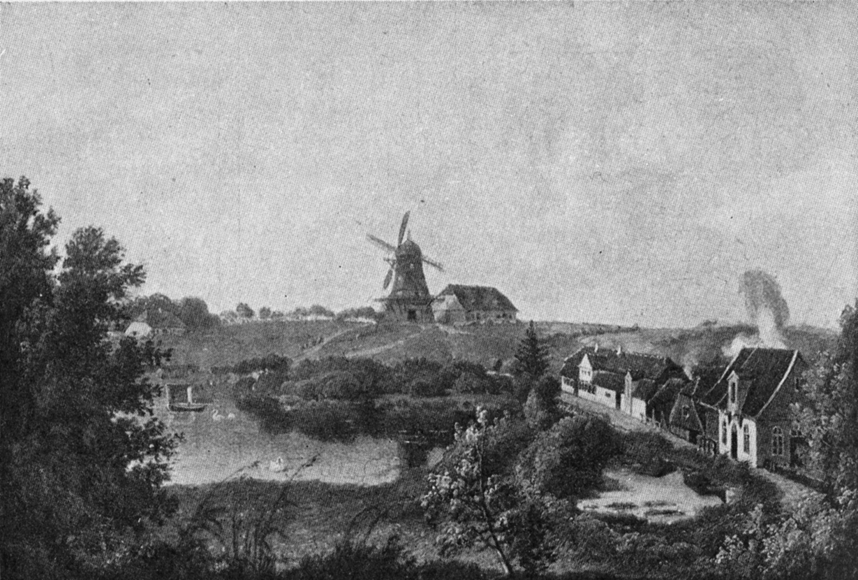 Fulgevad Mølle er en vand- og vindmølle som ligger ved Mølleåen nord for København.